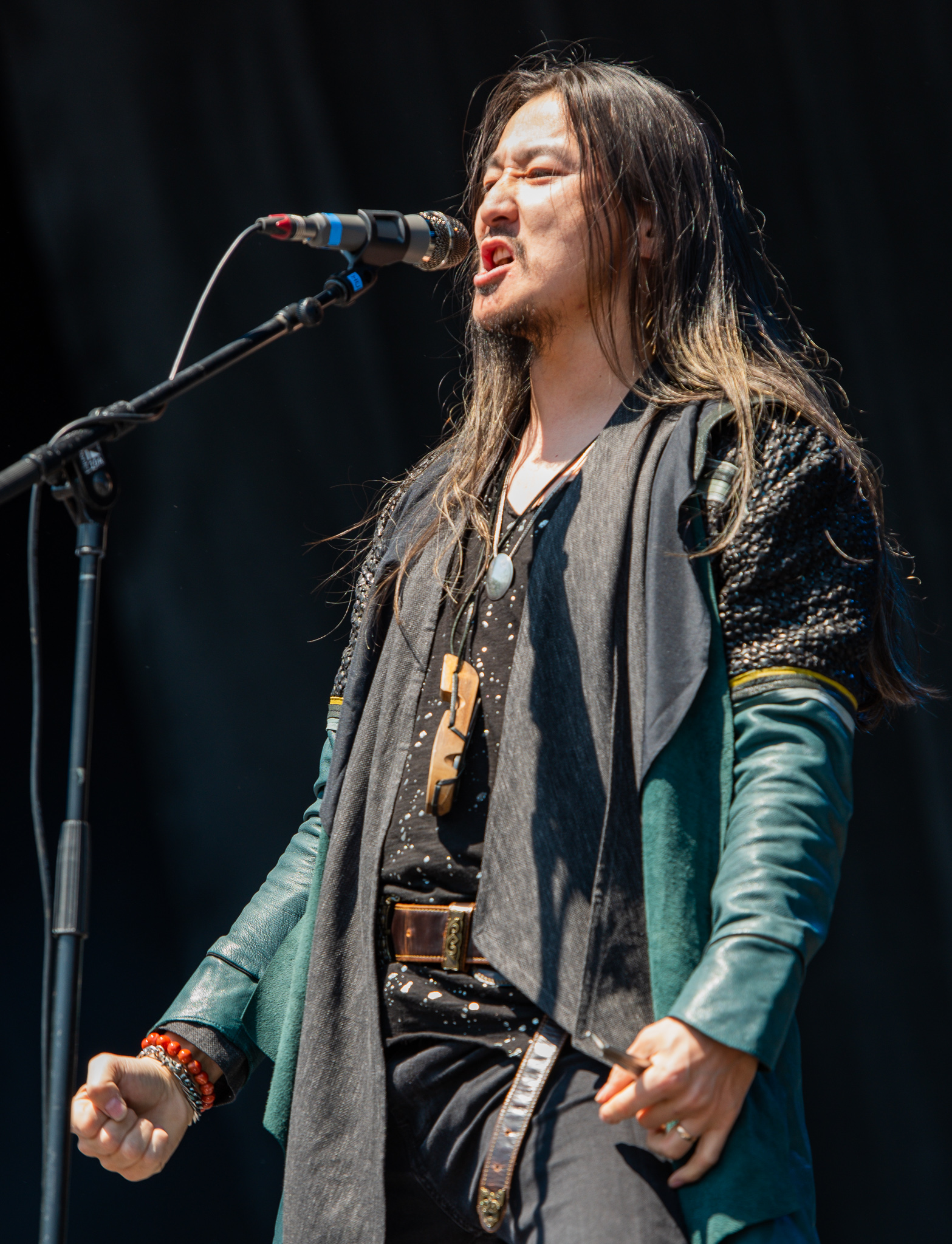 ARGO-Konzerte,Beck's Park Stage,Konzert,Livekonzert,Livemusik,Musik,RiP,Rock im Park 2019,The Hu